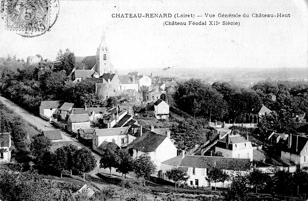 Vue générale, église et ruines du château, Château-Renard, Loiret, France